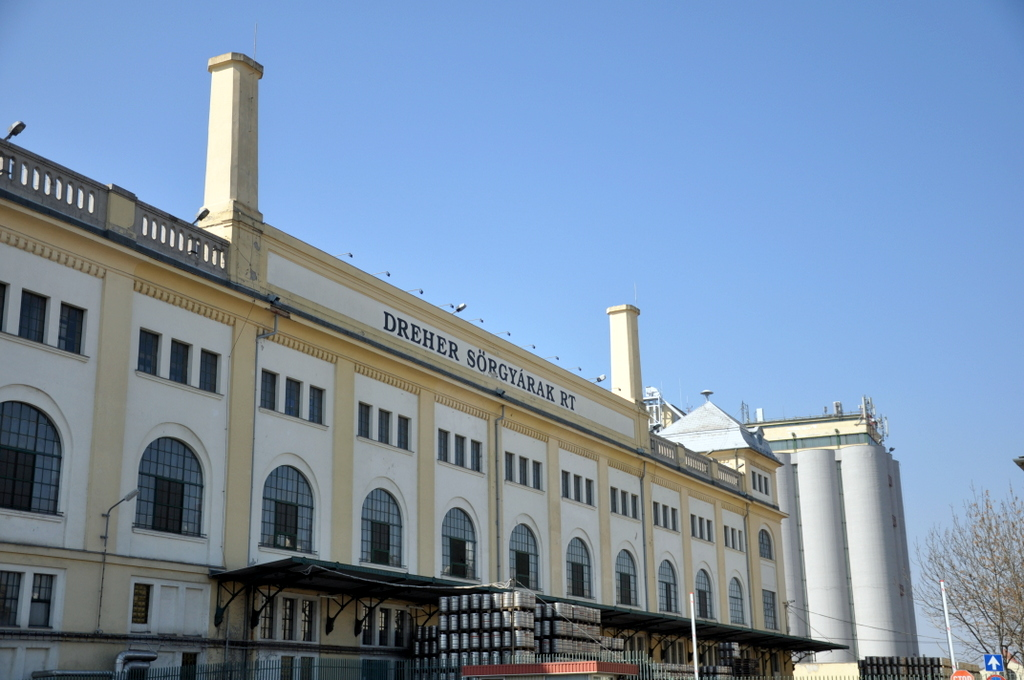 Dréher Beer Brewery in Budapest District X